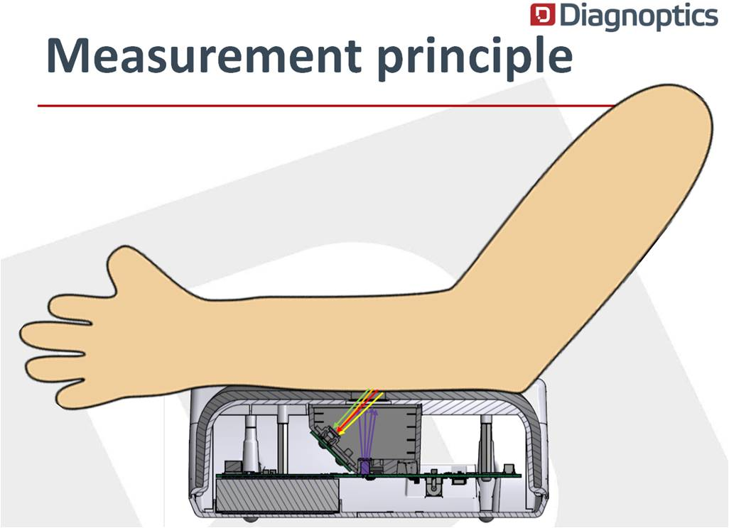 Het principe van de AGE Reader is vrij eenvoudig: de onderarm van de patiënt wordt op een steun gelegd. Het apparaat straalt korte tijd UV-licht met een golflengte van circa 370 nanometer op 4 cm2 huid, waarna het teruggekaatste licht wordt opgevangen en gemeten. De meetgegevens worden vervolgens geanalyseerd en binnen 15 seconden wordt de autofluorescentie van de huid in een resultatenscherm weergegeven.